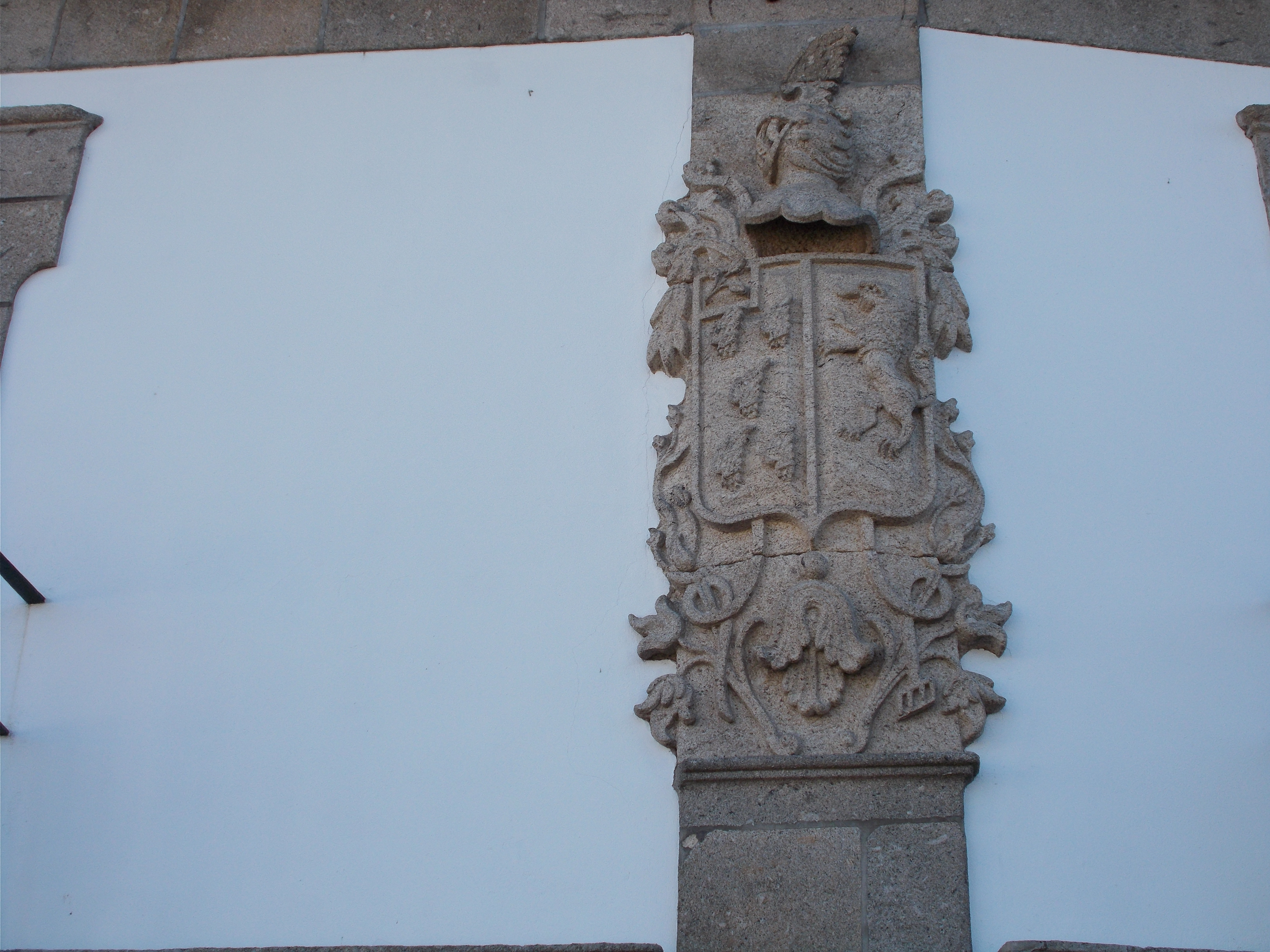 Brasão na paço dos Abreus do Pico de Regalados